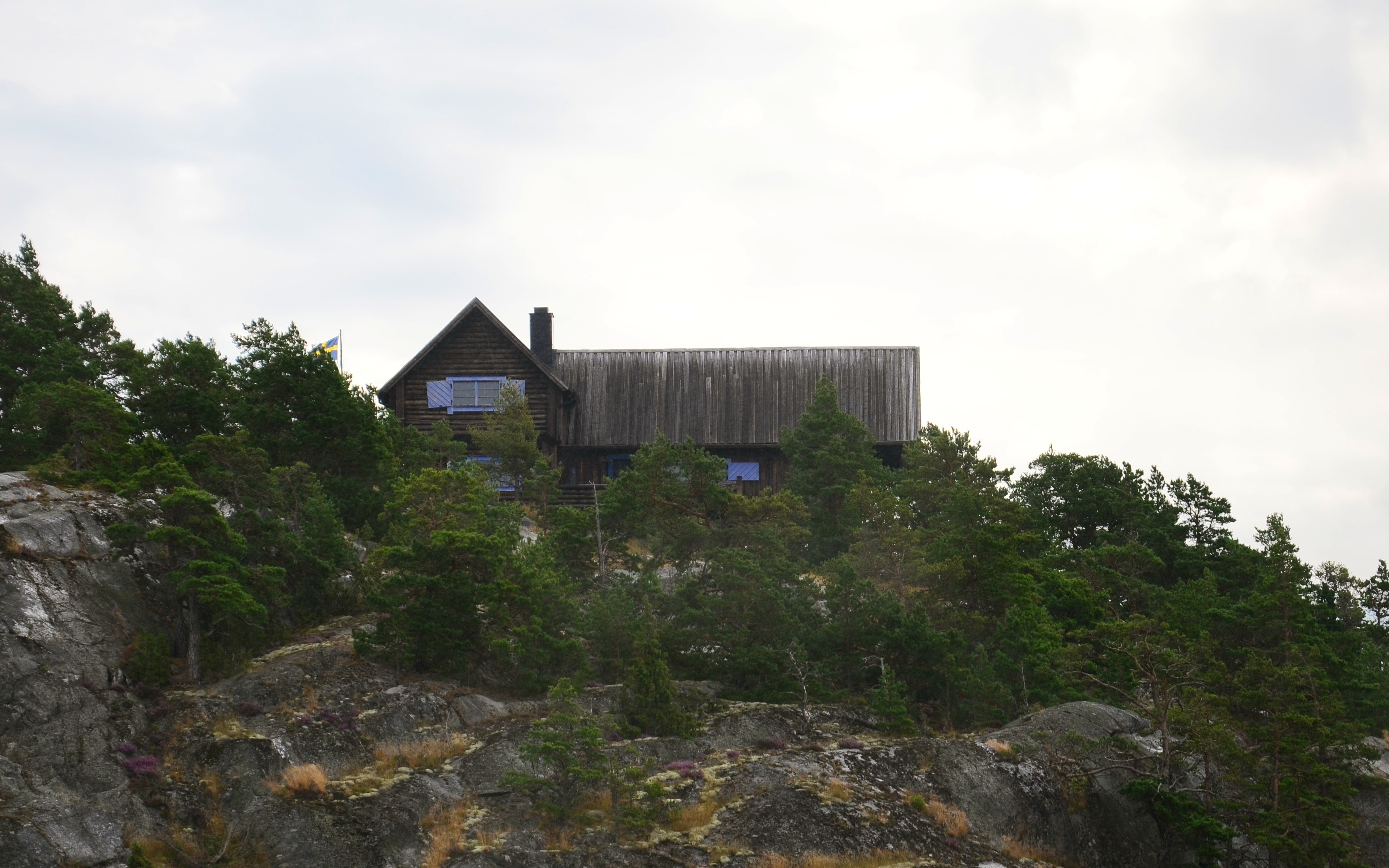 Jaktstugan på Mörtö-Bunsö i Stockholms skärgård.